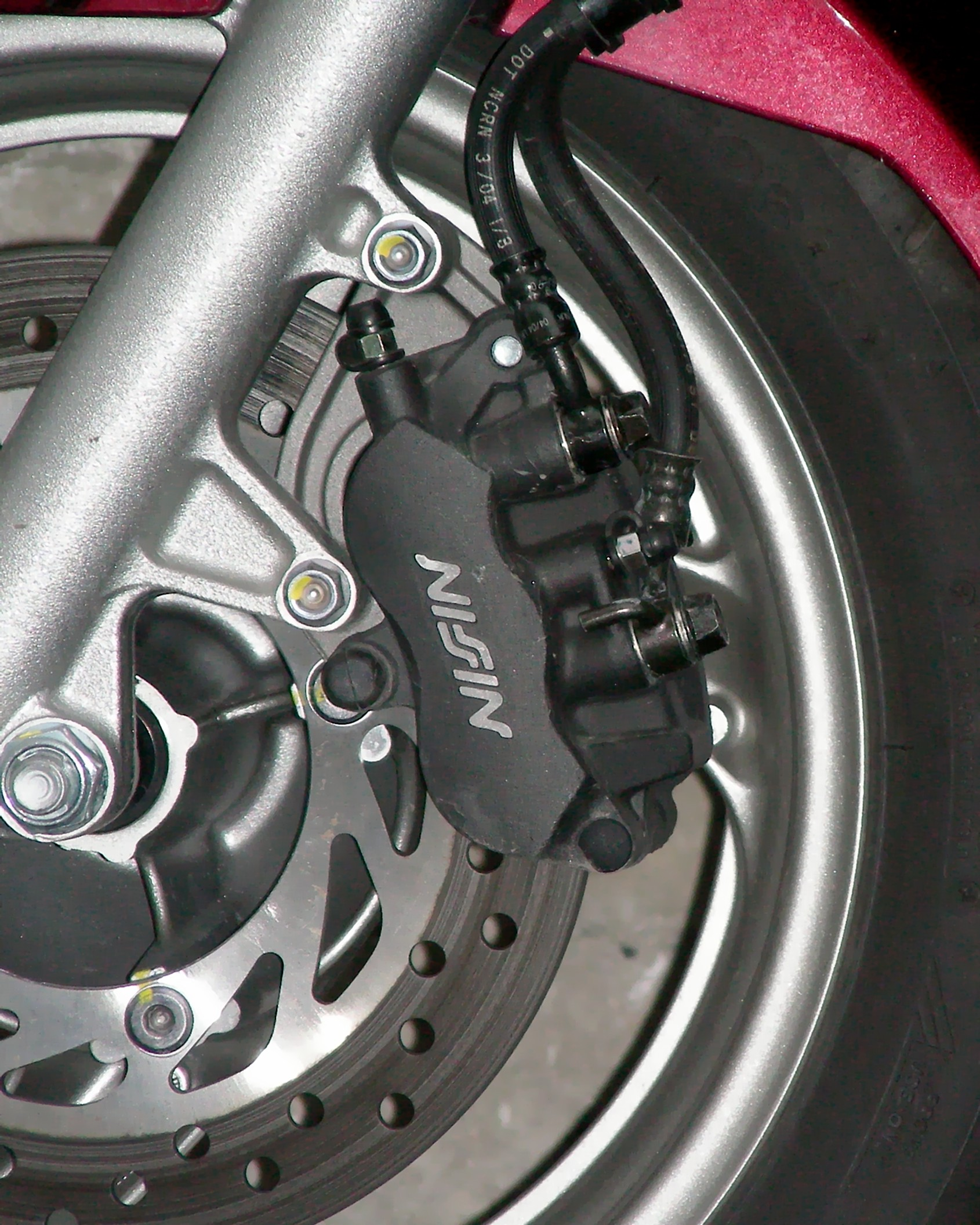 3 Kolben Brems Zange bei Honda_CBS